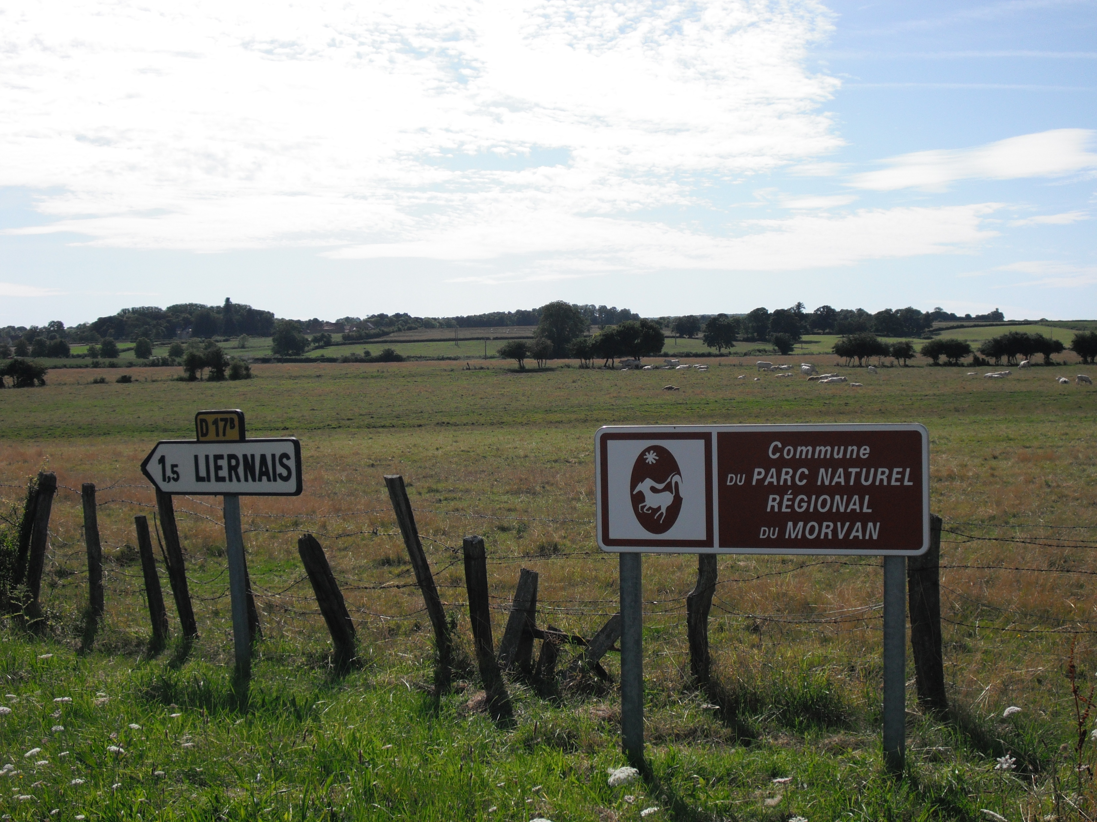 Photographie de Liernais, de son panneau d'entrée et d'appartenance au PNR du Morvan.